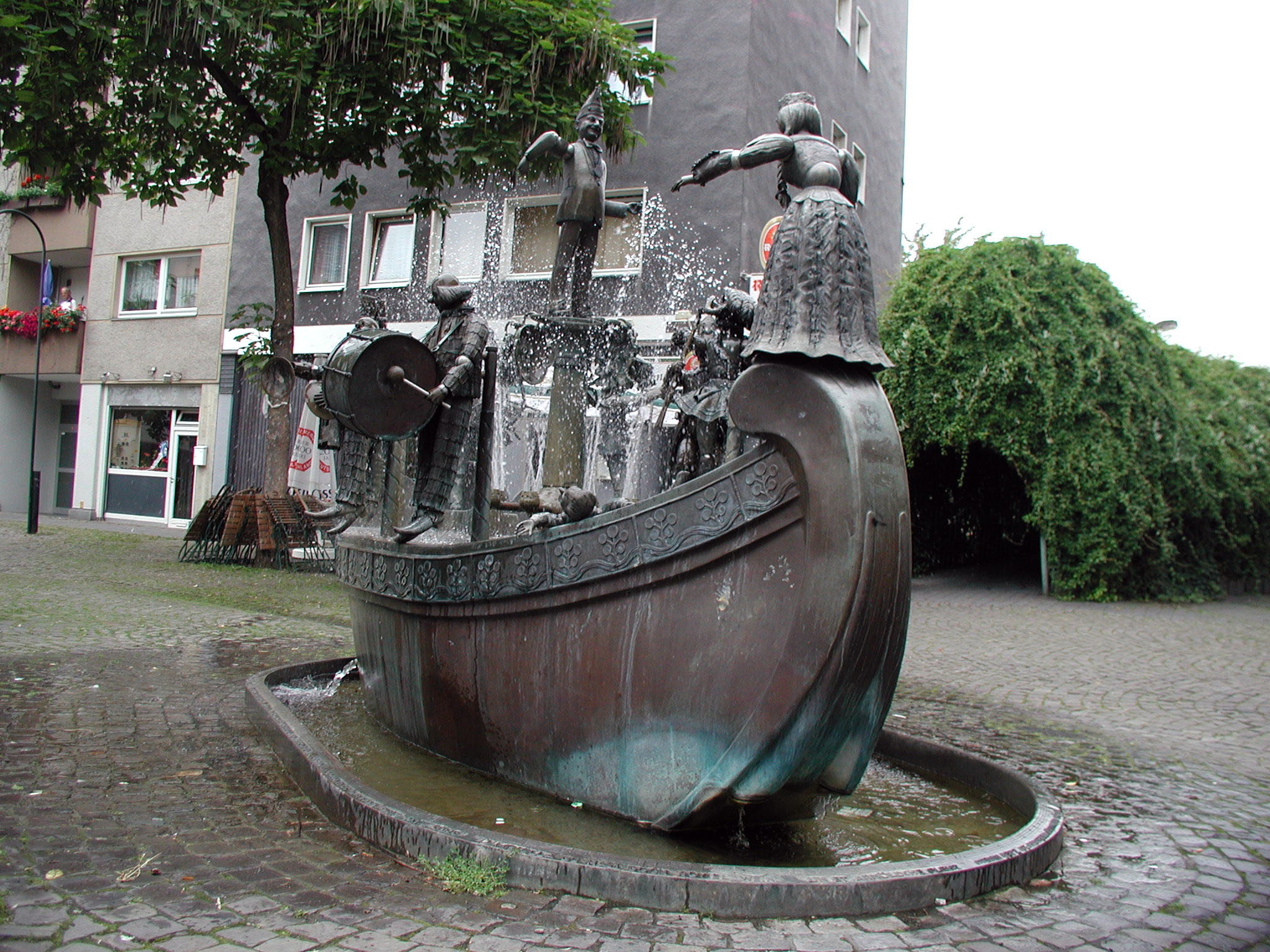 Köln, Karl-Berbuer-Platz, "Müllemer Bötche"